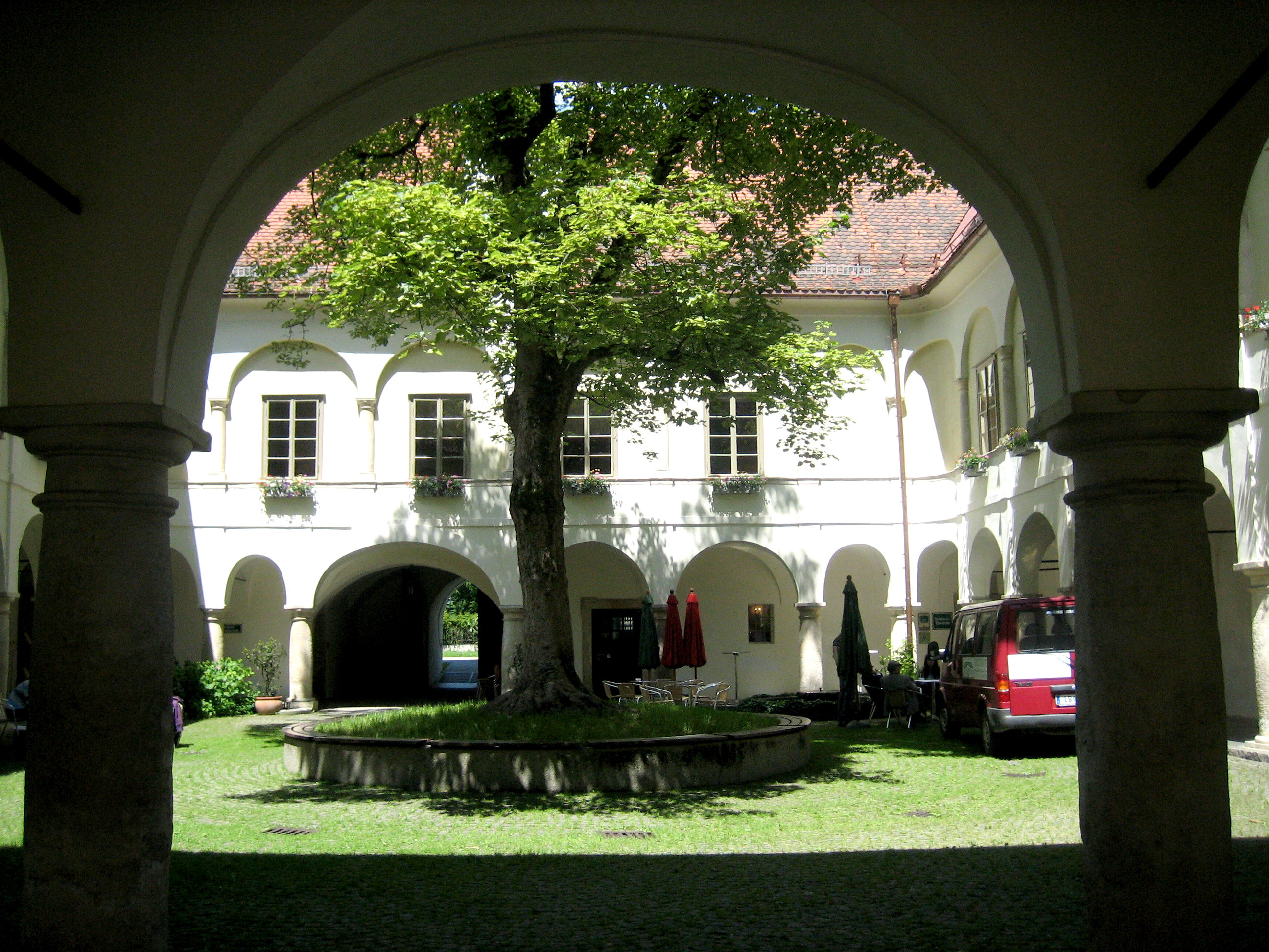 Gartenhaus des Schlosses Retzhof